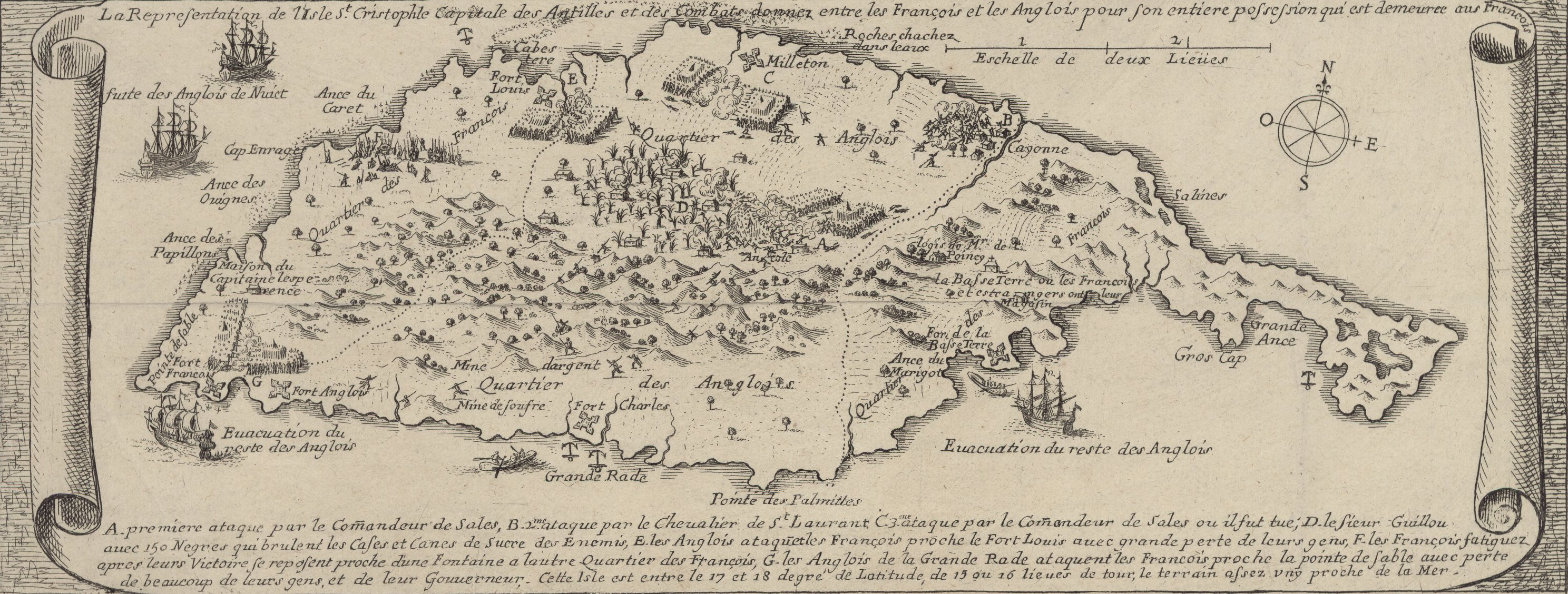 Carte de l'île de Saint-Christophe pendant la guerre de 1666 qui voit les Français prendre possession de toute l'île en chassant les Anglais, par Estienne Vouillemont, 1667.